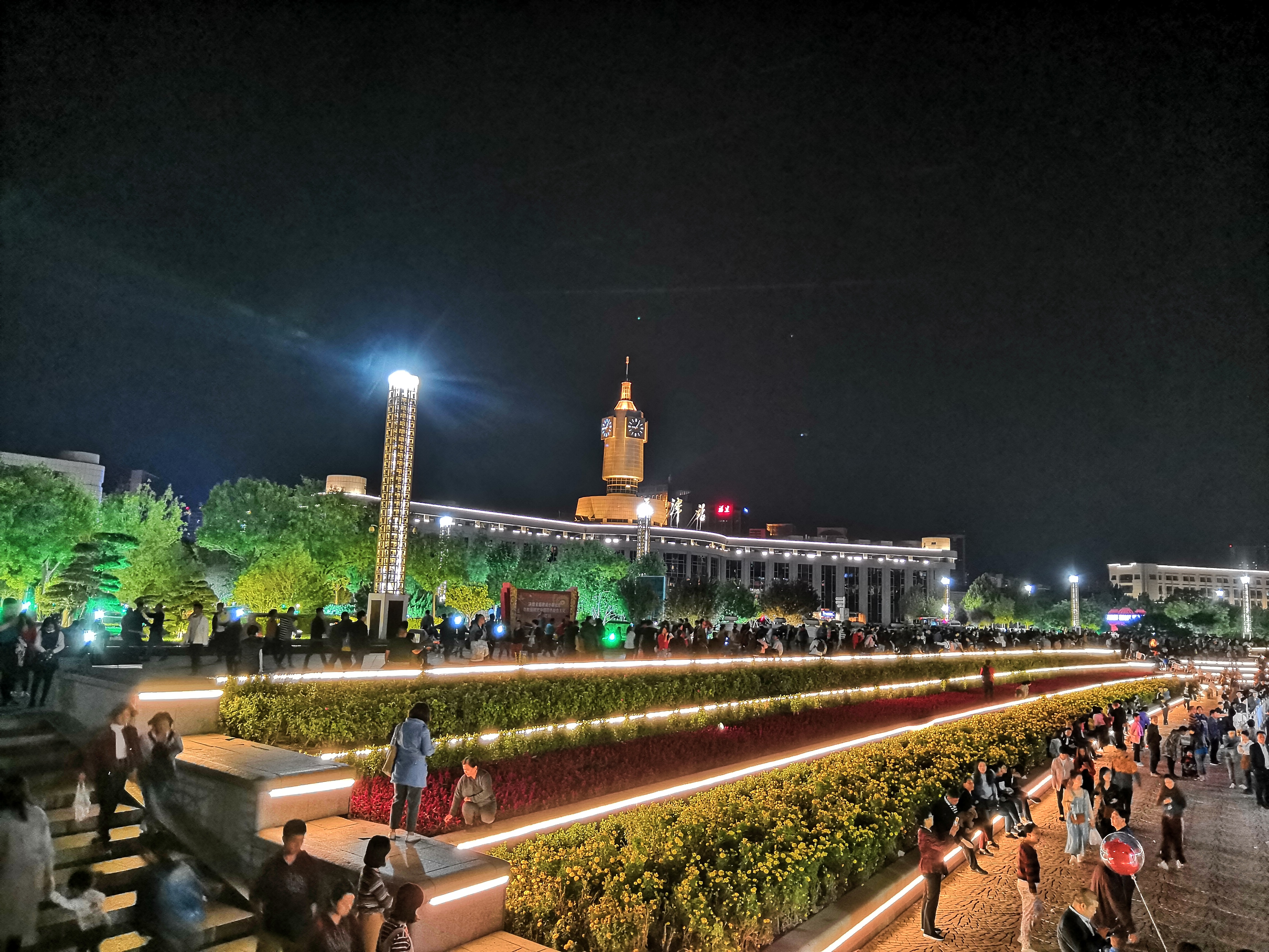 中文（中国大陆）: 天津站夜景